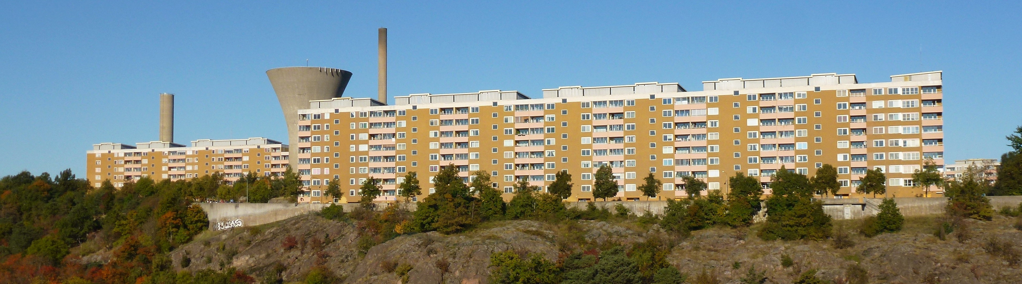 Henriksdalsberget 2013